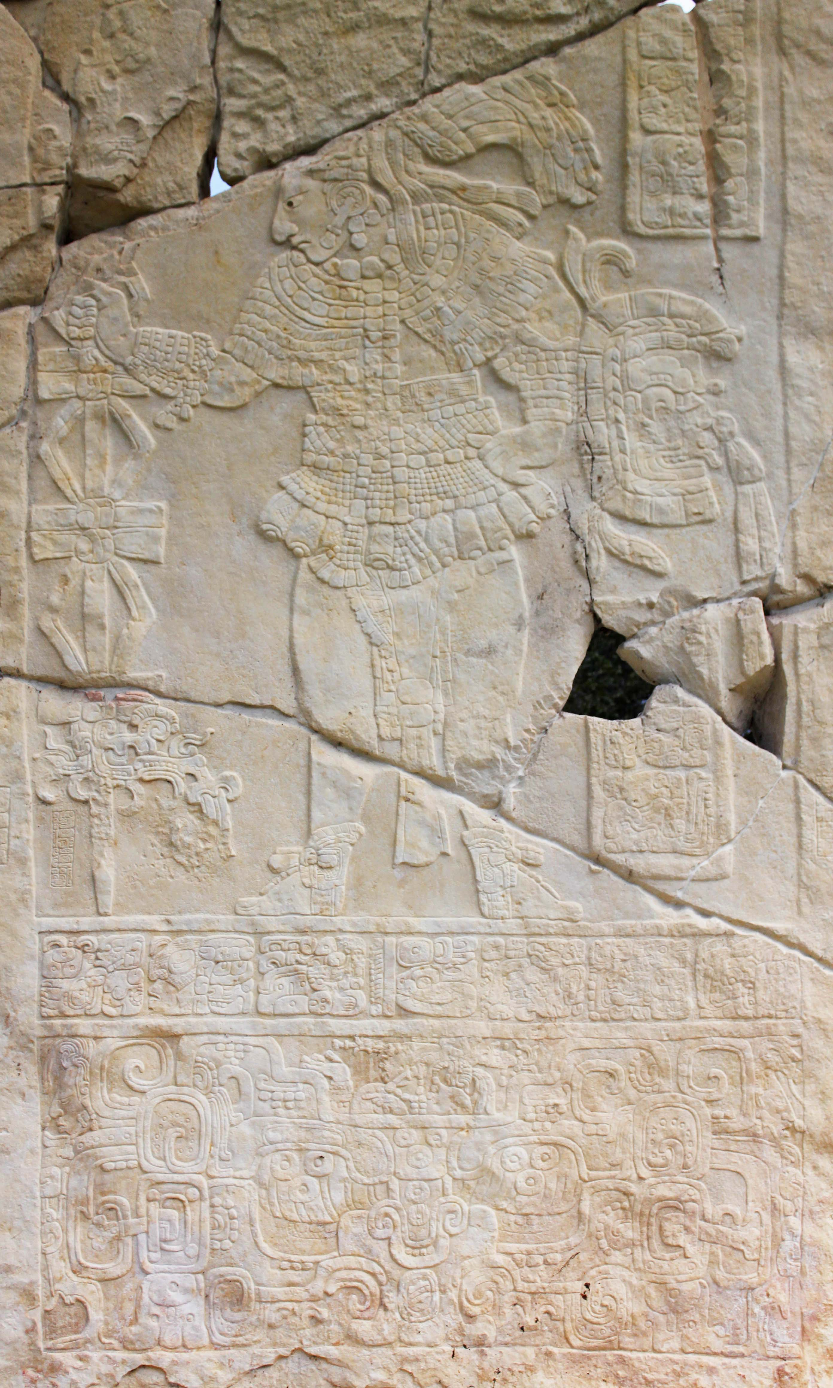 Estela 1 de Bonampak representa Chan Muwan II